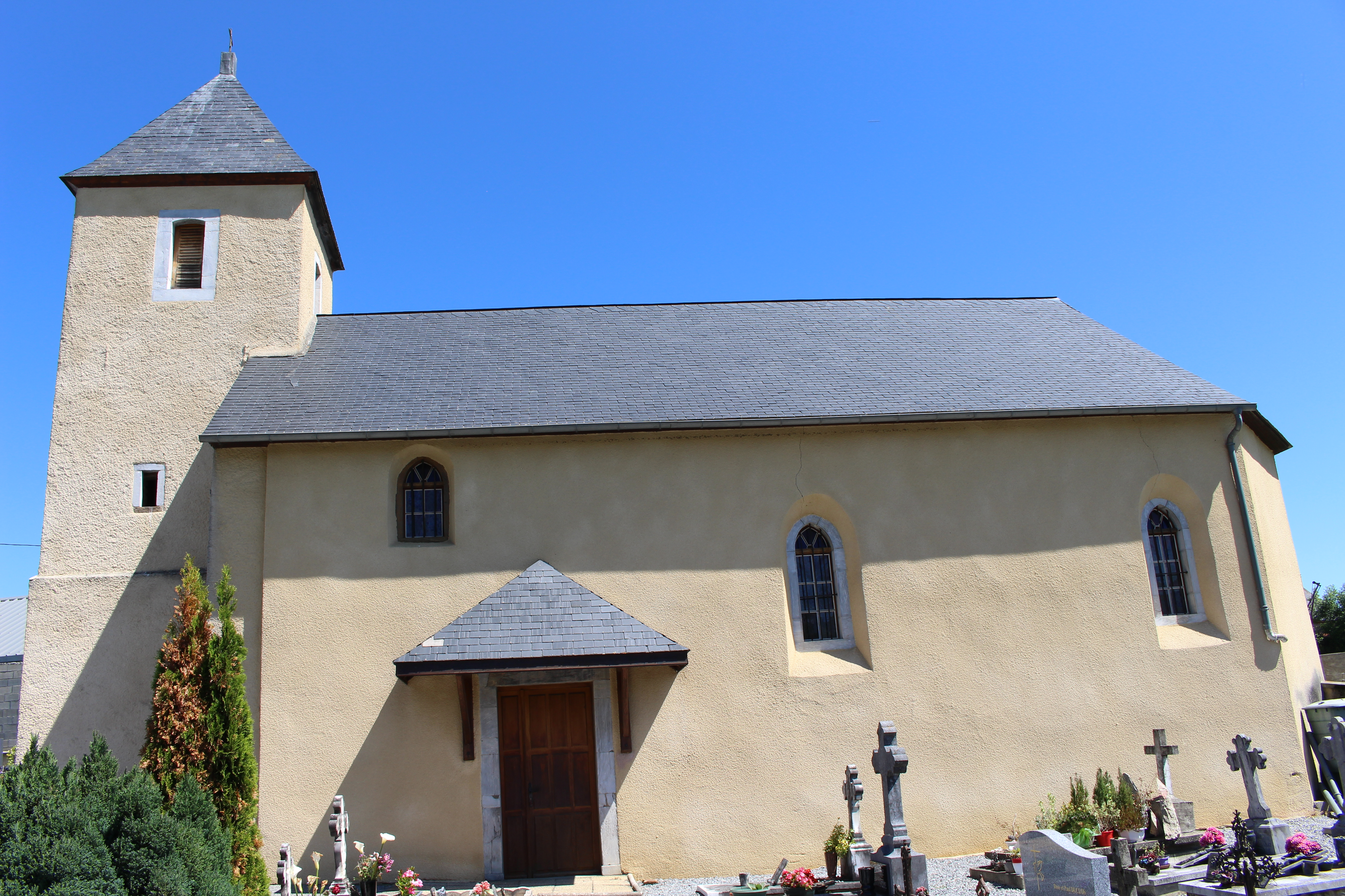 Église Saint-Jacques d'Esconnets (Hautes-Pyrénées)